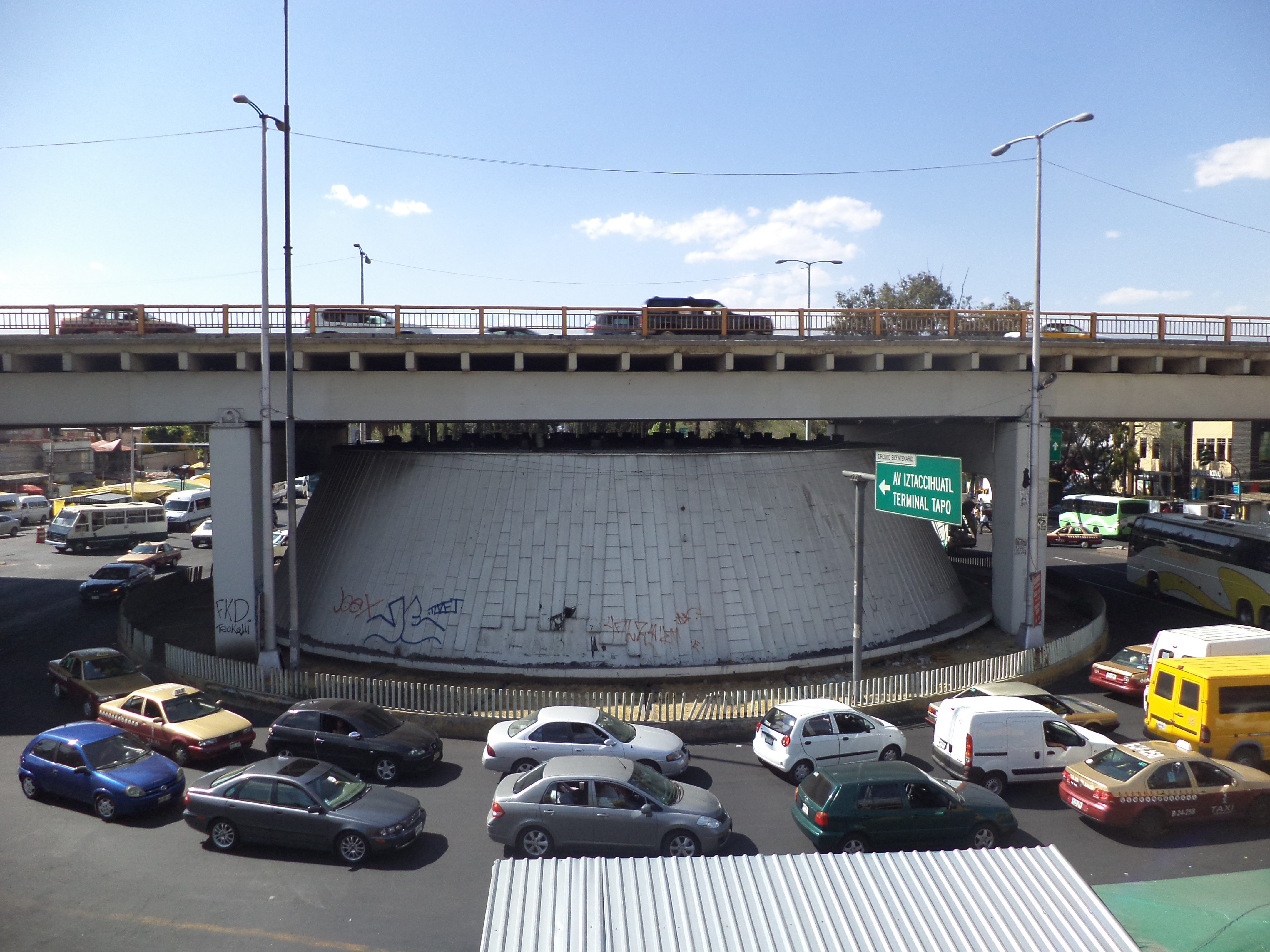 Cruce de Calzada Ignacio Zaragoza y Circuito interior Boulevard Puerto Aereo